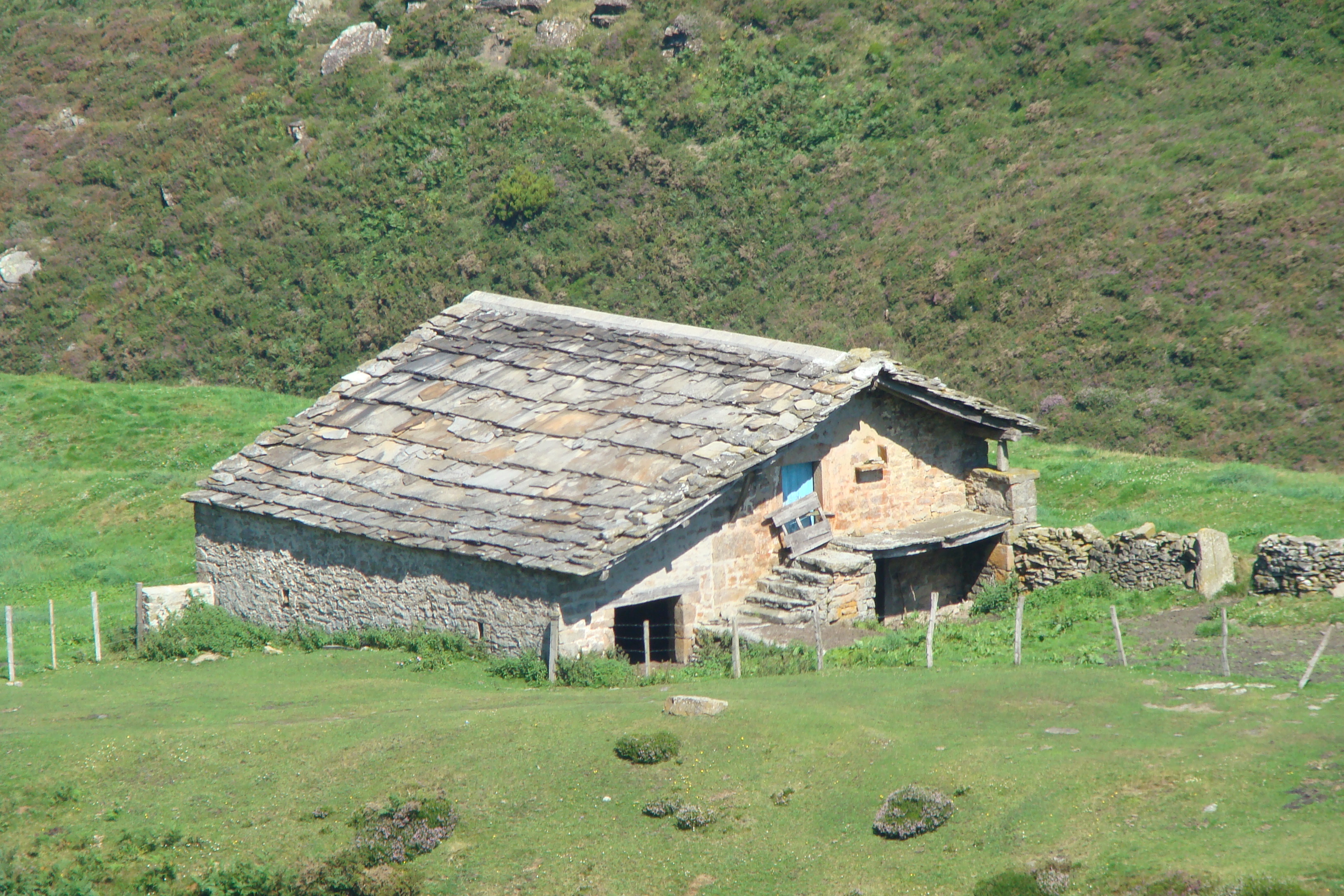 ejemplo de cabaña pasiega (Valle de Soba)